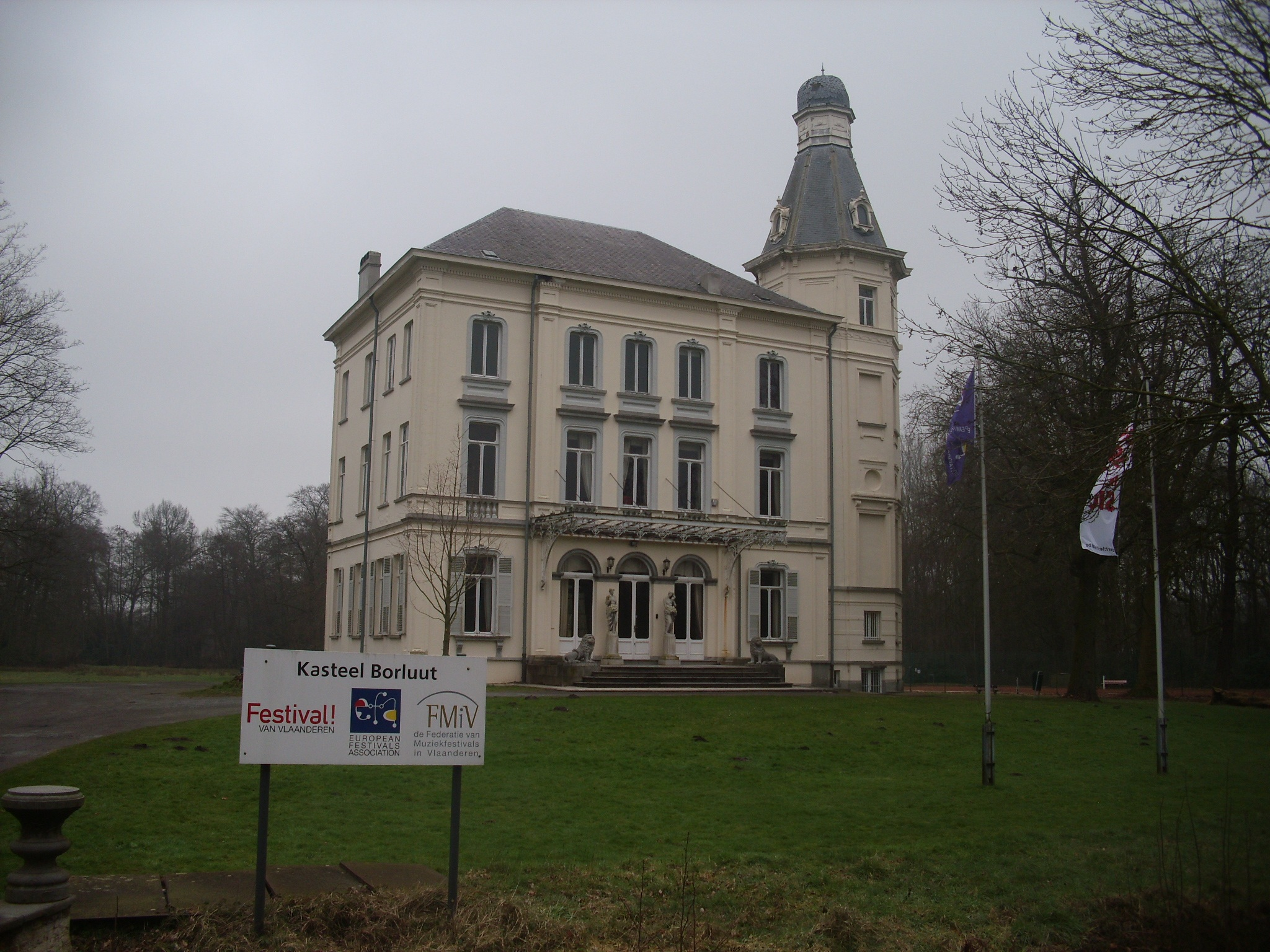 Secretariaat van een aantal (internationale) culturele organisaties - Kasteel Borluut - Kleine Gentstraat 46 - Sint-Denijs-Westrem - Gent - Oost-Vlaanderen - België